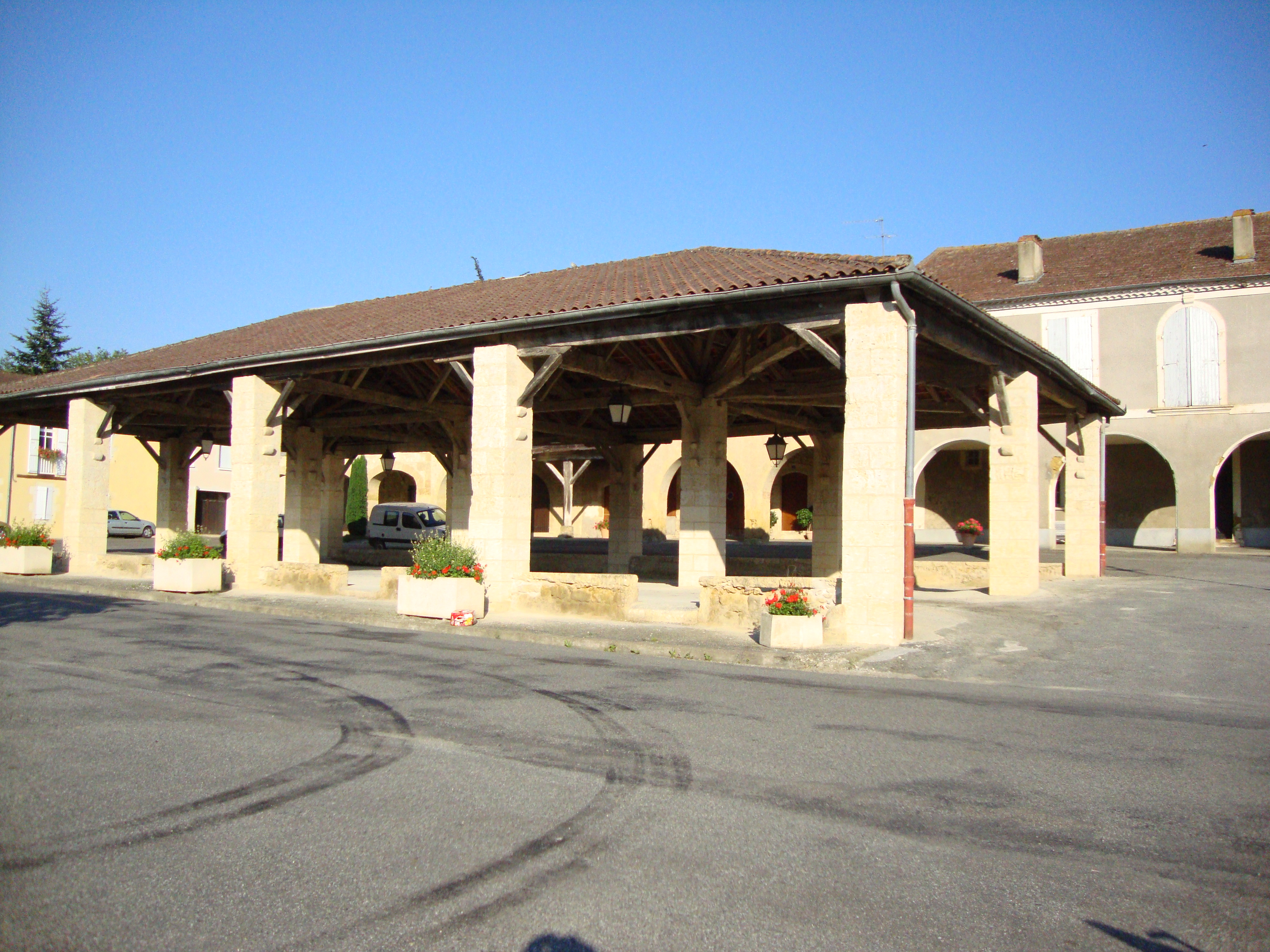 Barran (Gers, Fr) les halles